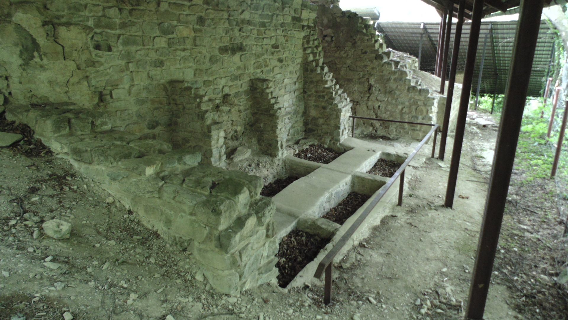 Криптата в стария Патлейнски манатир